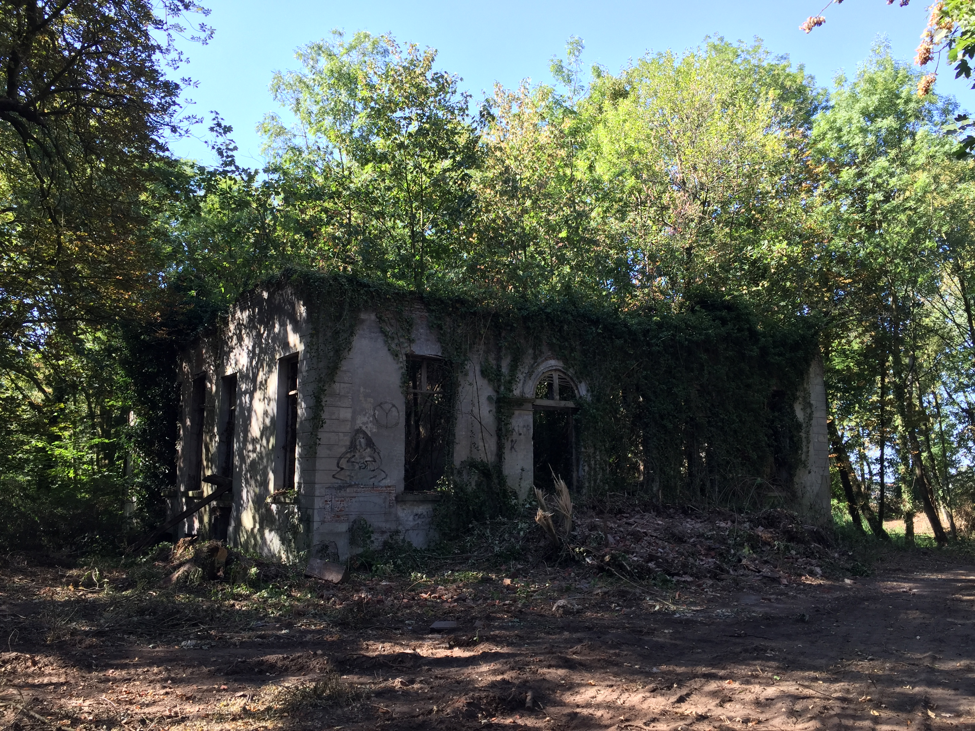 Getrokken in augustus 2018, tijdens een wandeltocht.